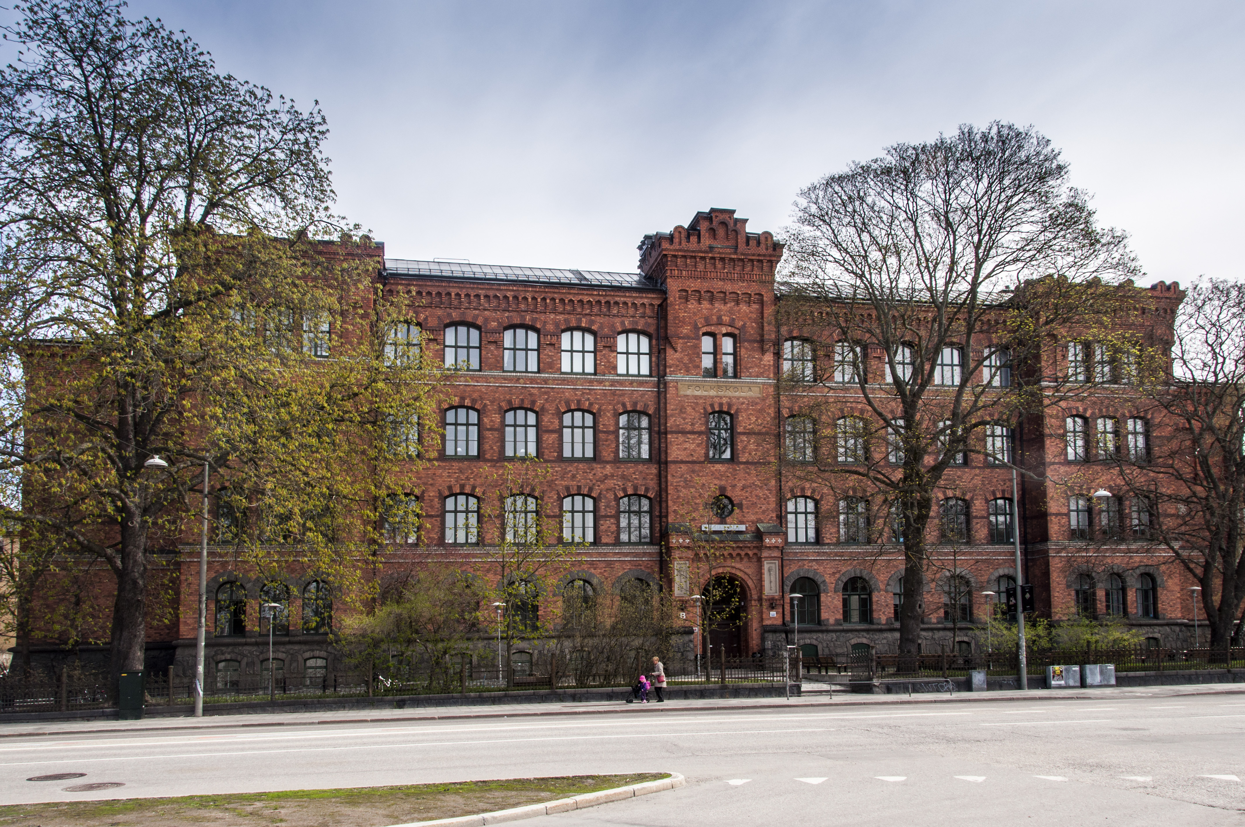 Maria folkskola, Maria skolgata 52, Ringvägen 23, Nybyggnadsår 1890 - 1892, A. Andersson (Byggmästare) Ernst Haegglund (Arkitekt) Maria Församl Skolbyggnadskommitté (Byggherre) Patrik Hanzon (Byggmästare)